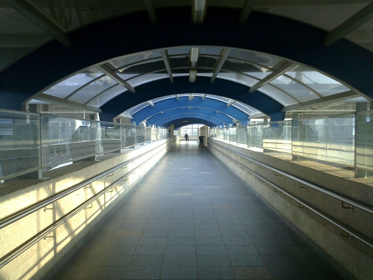 Brücke des portal Américas von TransMilenio in Bogota